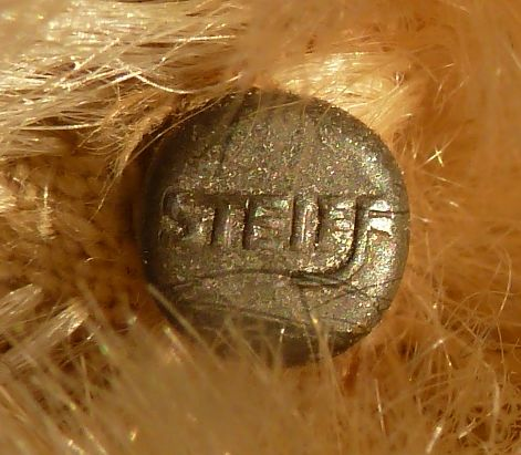 Steiff-Loge (Knopf im Ohr); weisser Steiff-Teddybär (1910)